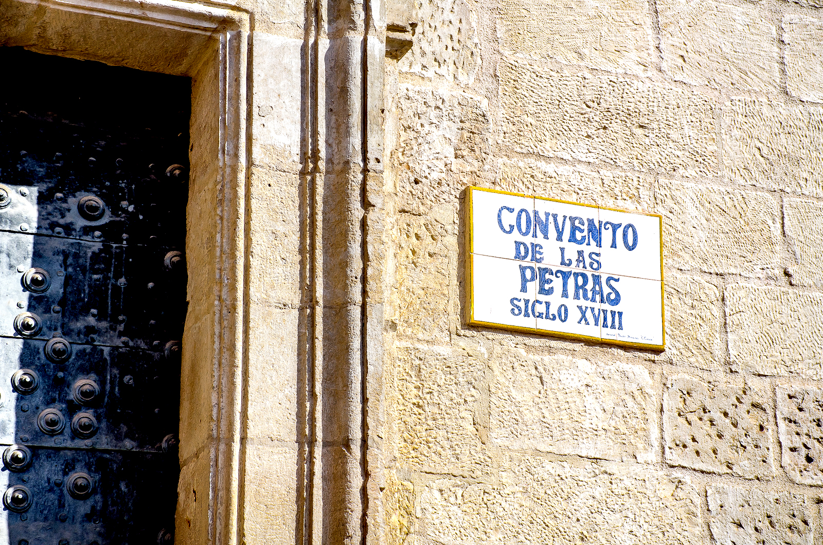 Detalle de la portada del Convento de las Petras de Cuenca (España).